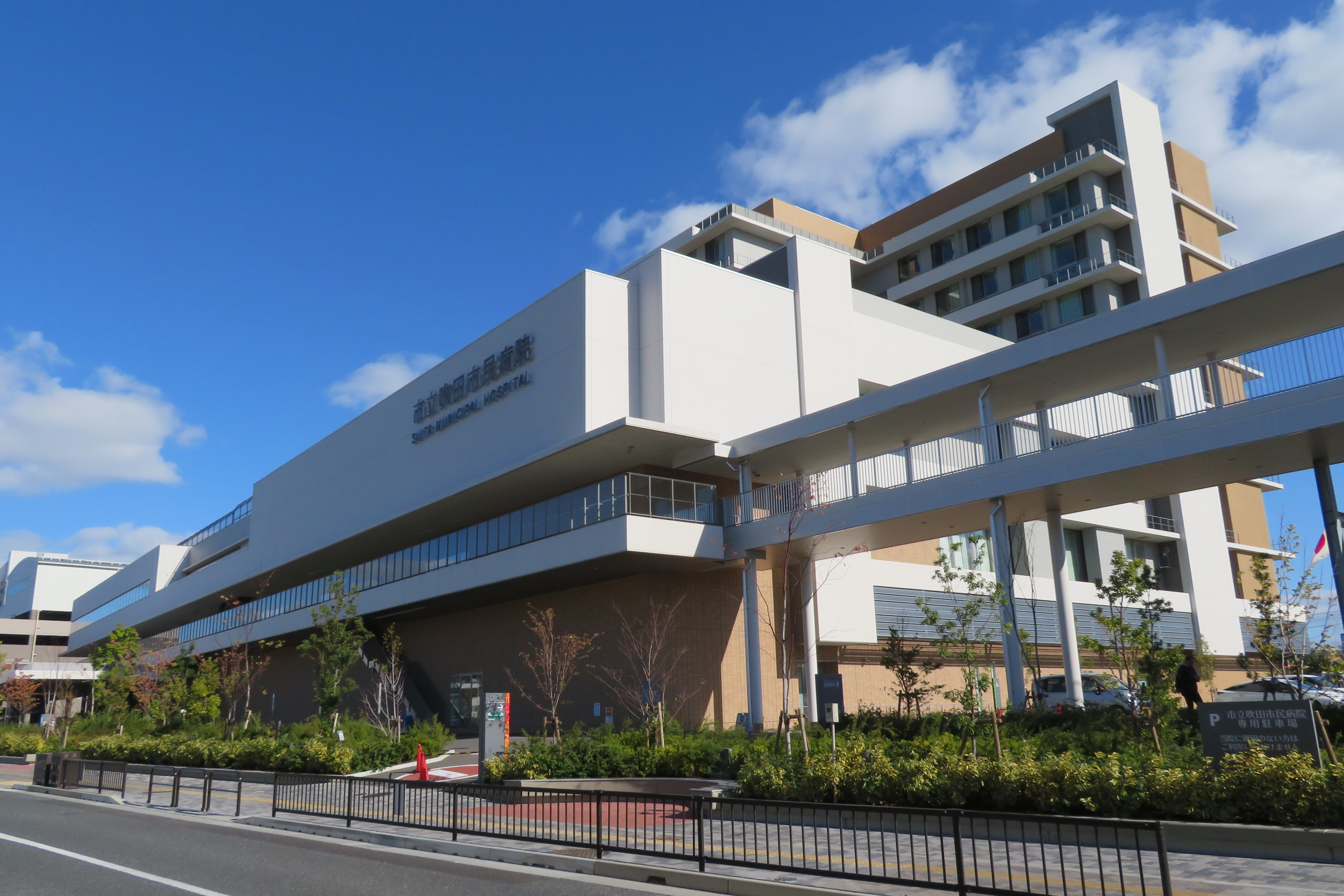 市立吹田市民病院